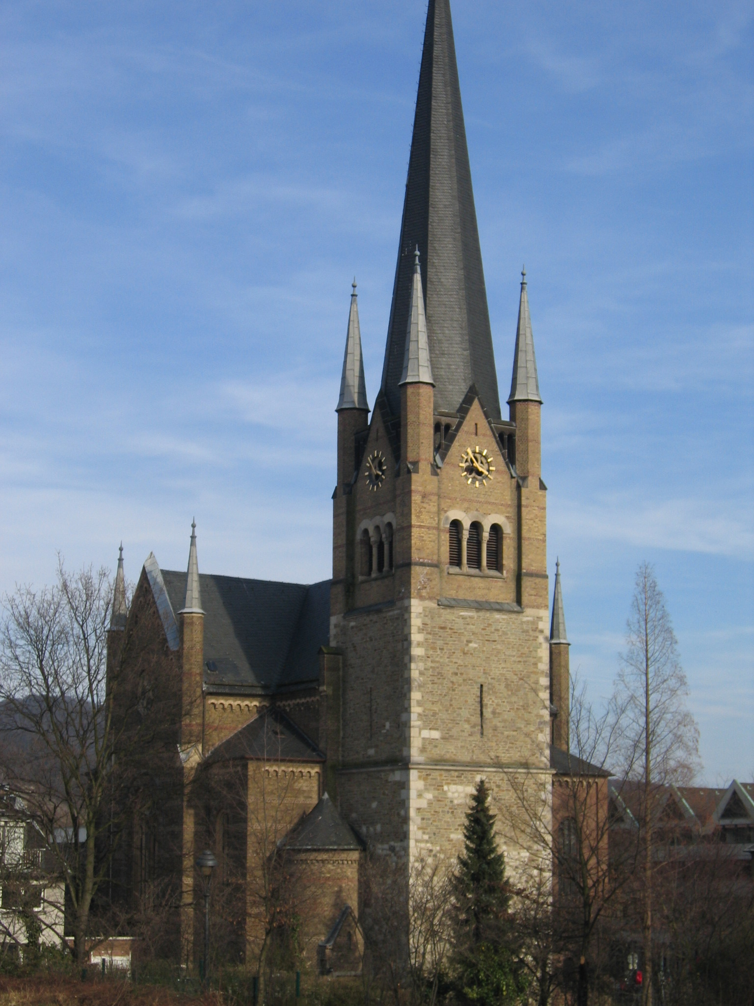 Katholische Pfarrkirche St. Severin, Bonn-Mehlem